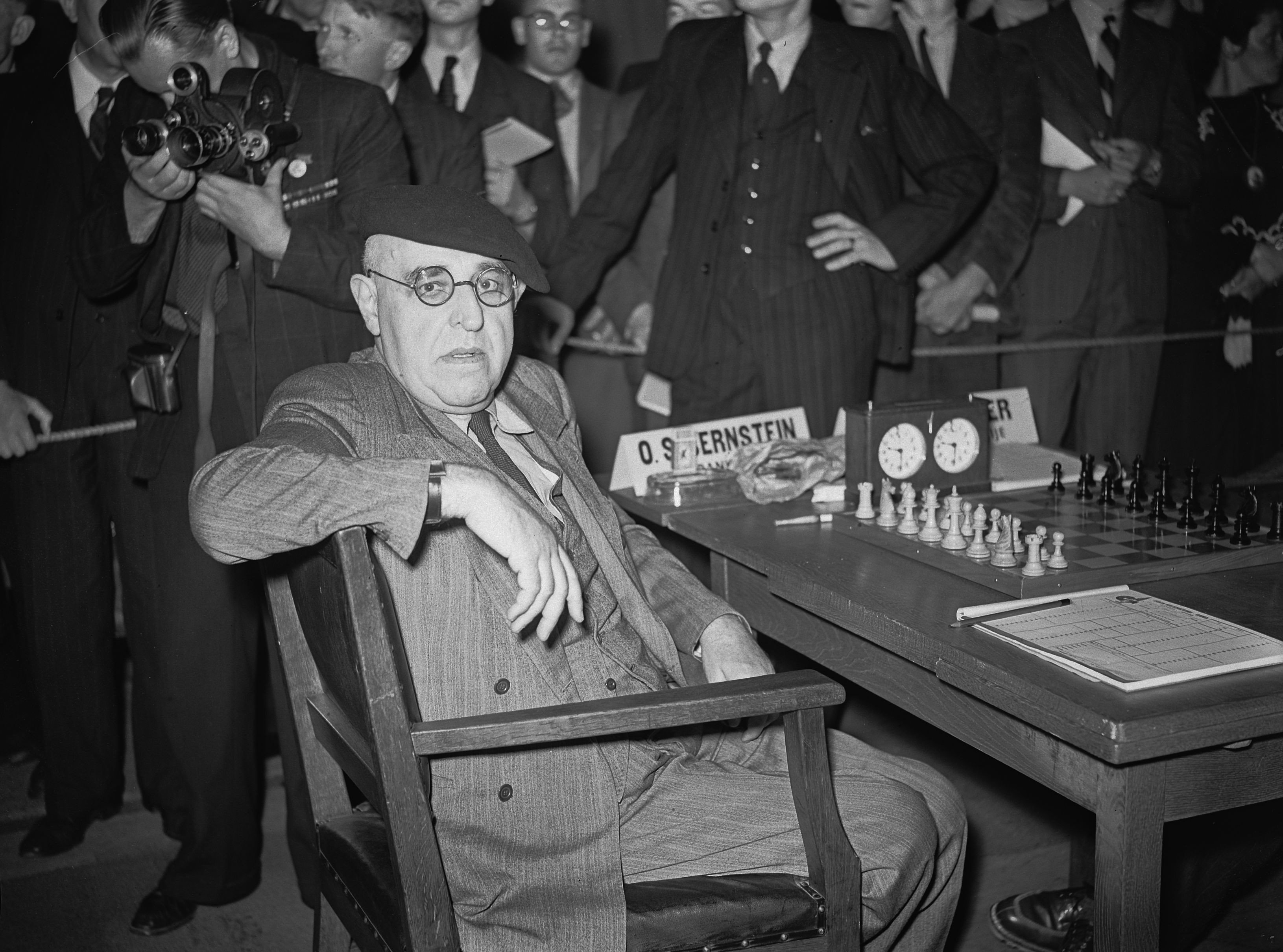 Collectie / Archief : Fotocollectie Anefo Reportage / Serie : [ onbekend ] Beschrijving : Schaaktoernooi Groningen Datum : 12 augustus 1946 Locatie : Groningen Trefwoorden : SCHAAKTOURNOOI Fotograaf : Fotograaf Onbekend / Anefo Auteursrechthebbende : Nationaal Archief Materiaalsoort : Glasnegatief Nummer archiefinventaris : bekijk toegang 2.24.01.09 Bestanddeelnummer : 901-8915